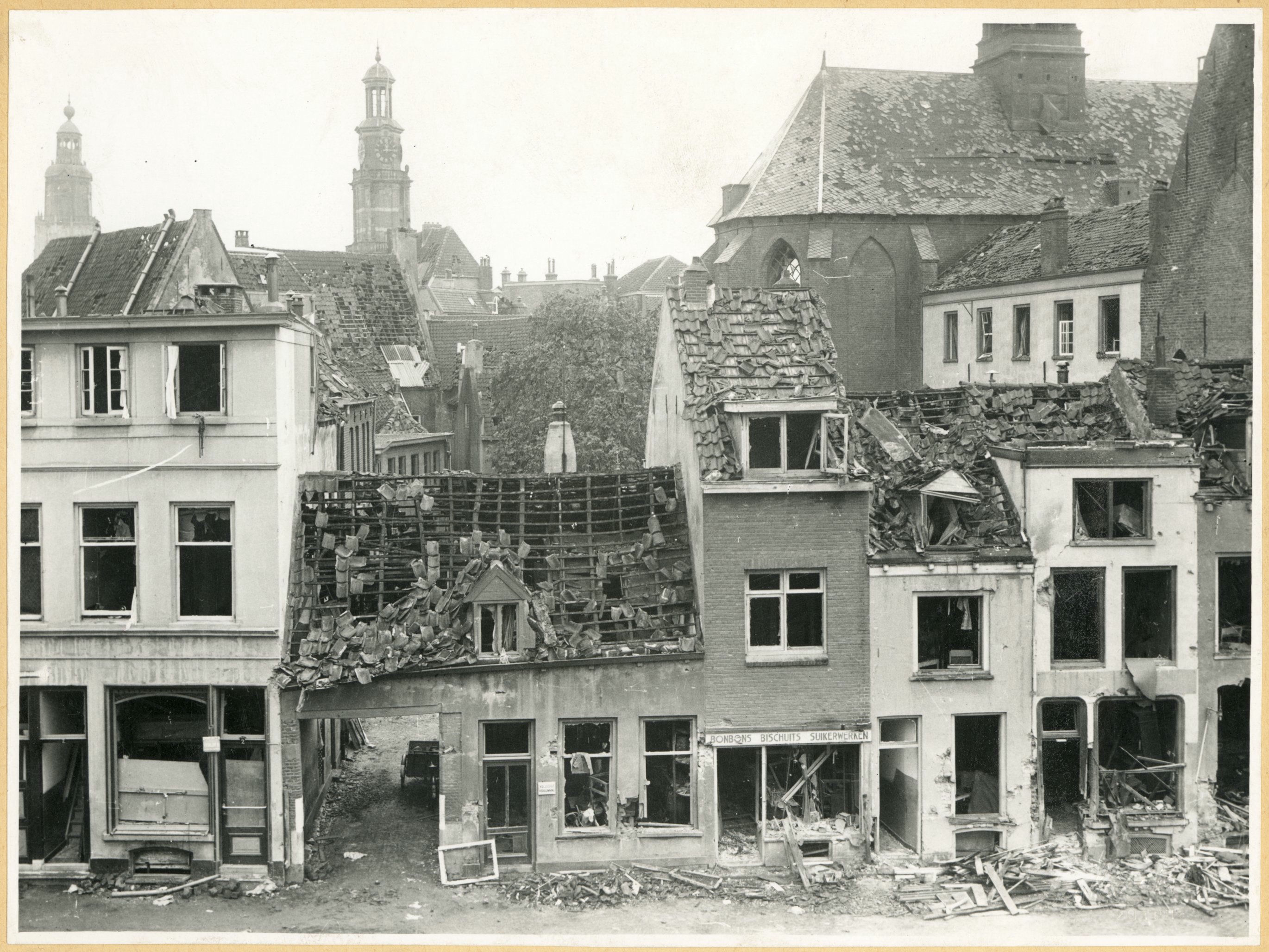 Rijkslandbouw winterschool: Voorgevels met oorlogsschade na bombardement; op de achtergrond twee kerktorens (opmerking: Bijschrift achterzijde: "Huisje links van de Rijkslandbouw winterschool. Rechts de Broederkerk")